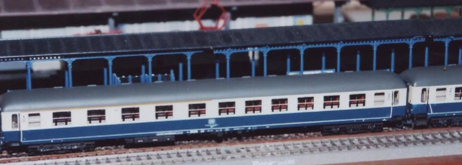 Roco-Modell eines Wagens des Typs ABm225